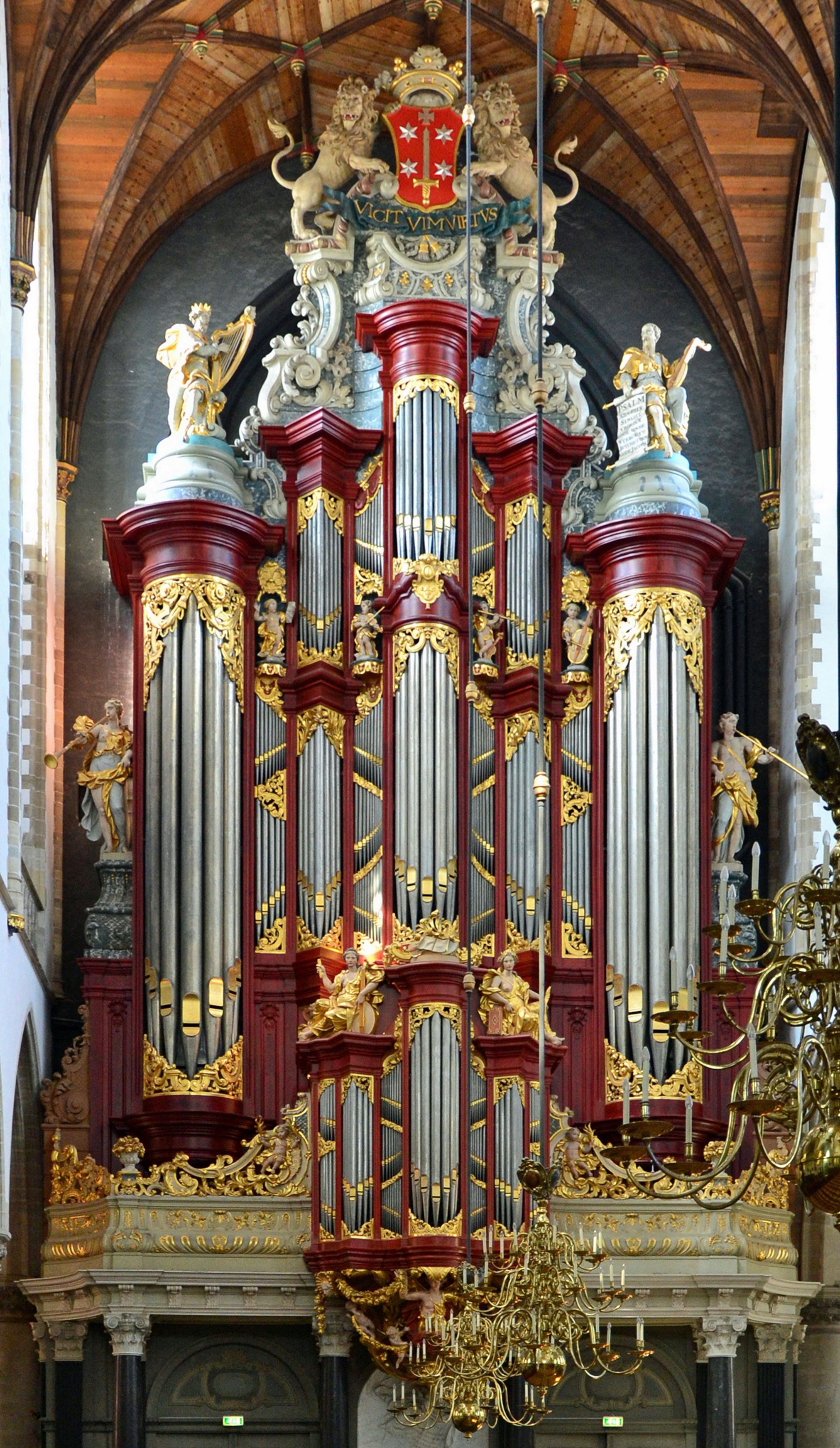 Die Orgel von Christian Müller aus dem Jahr 1738 in der St. Bavochurch of Haarlem.